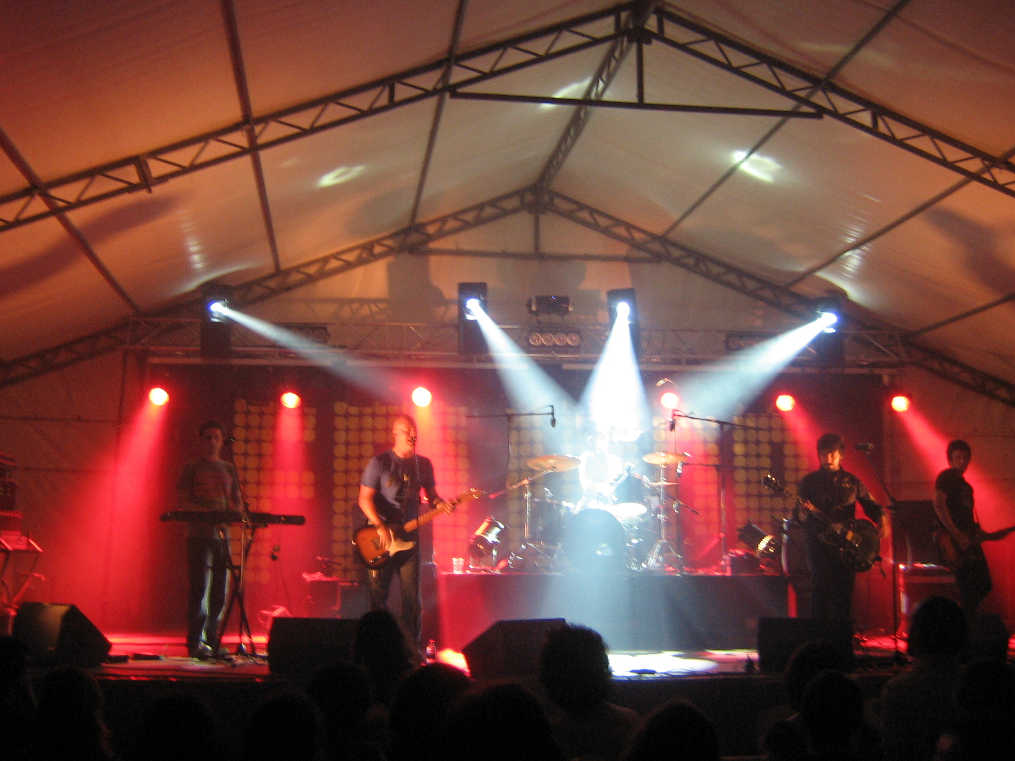 Super Ratones, concierto en el Festival Felipop, Fene, La Coruña, España, año 2008.